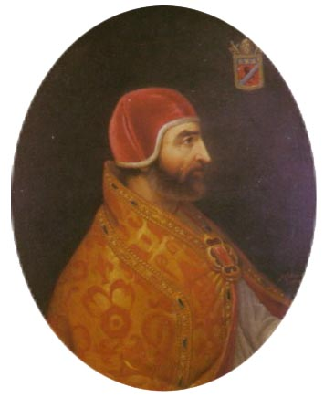 oude gravure Paus Innocent VI. Waarschijnlijk 14e eeuw.